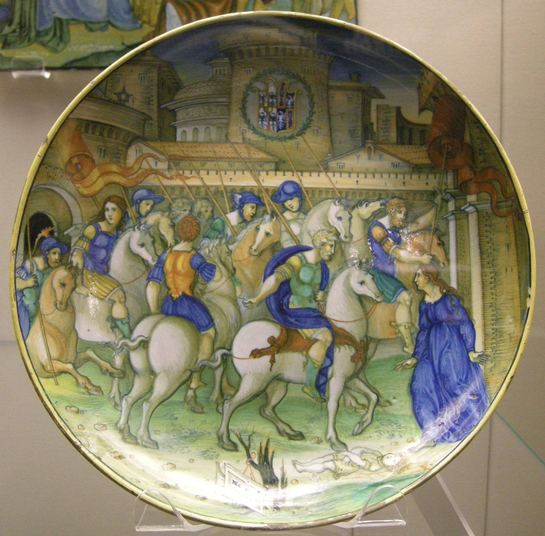 Urbino, piatto con traiano che ferma il suo esercito fuori roma per ascoltare una richiesta, stemma isabella d'este